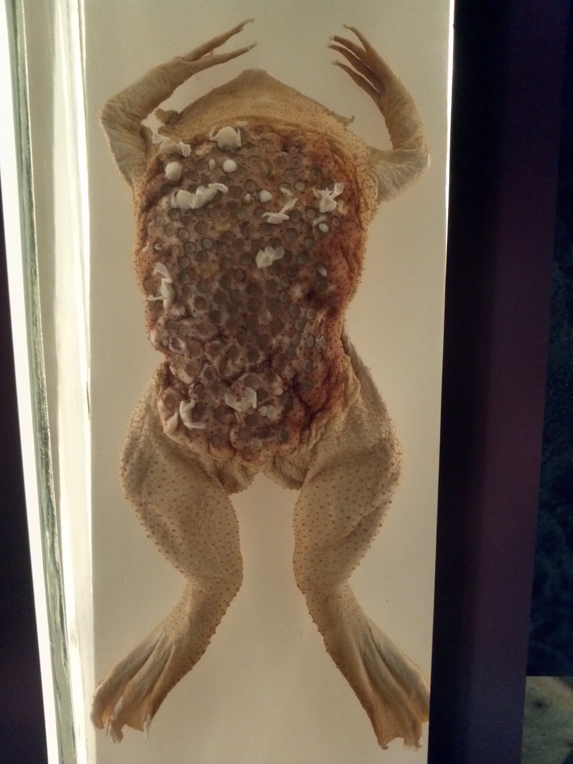 Pipa pipa